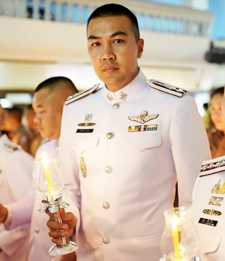 พันตำรวจโทสืบศักดิ์ ผันสืบ